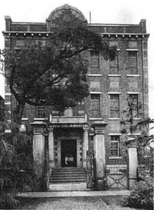 岸和田紡績岸和田本社、1941年以前